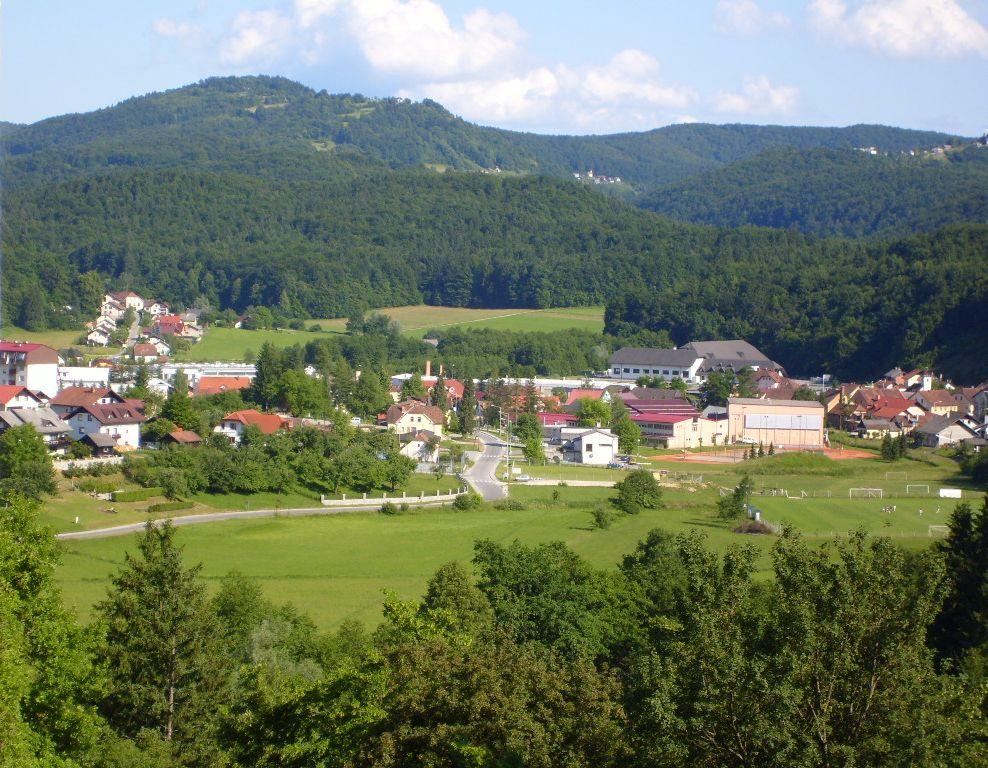 Mirna in Mirnska dolina z gradu